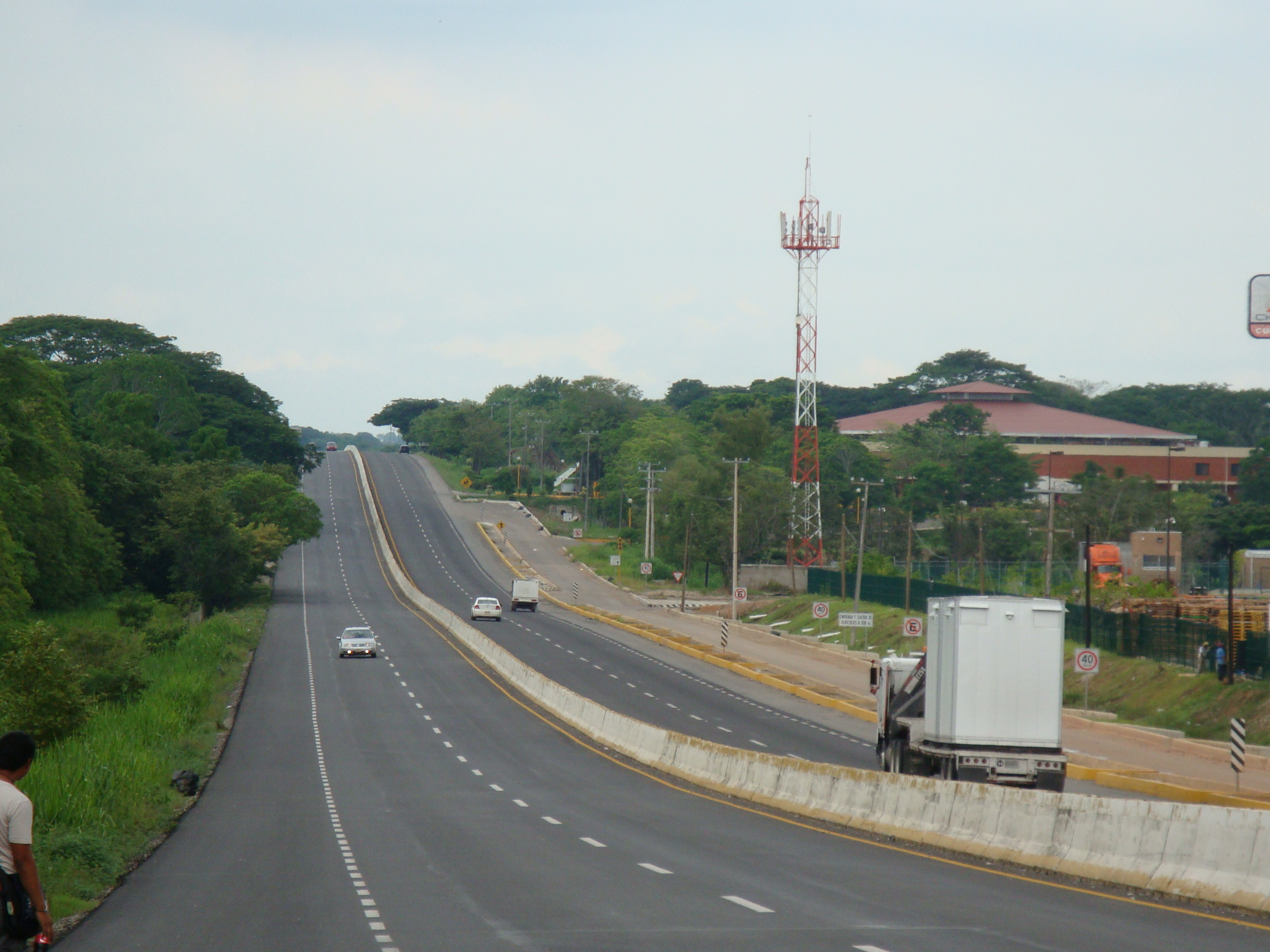 Carretera federal 186, Villahermosa-Chetumal, tramo Autopista de 4 carriles Villahermosa-Macuspana, en Tabasco, México.